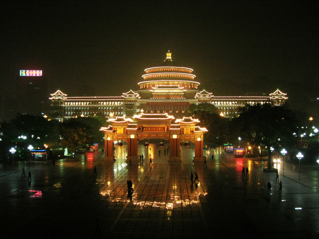 Runa Simi: Chongqing Munisipyu.